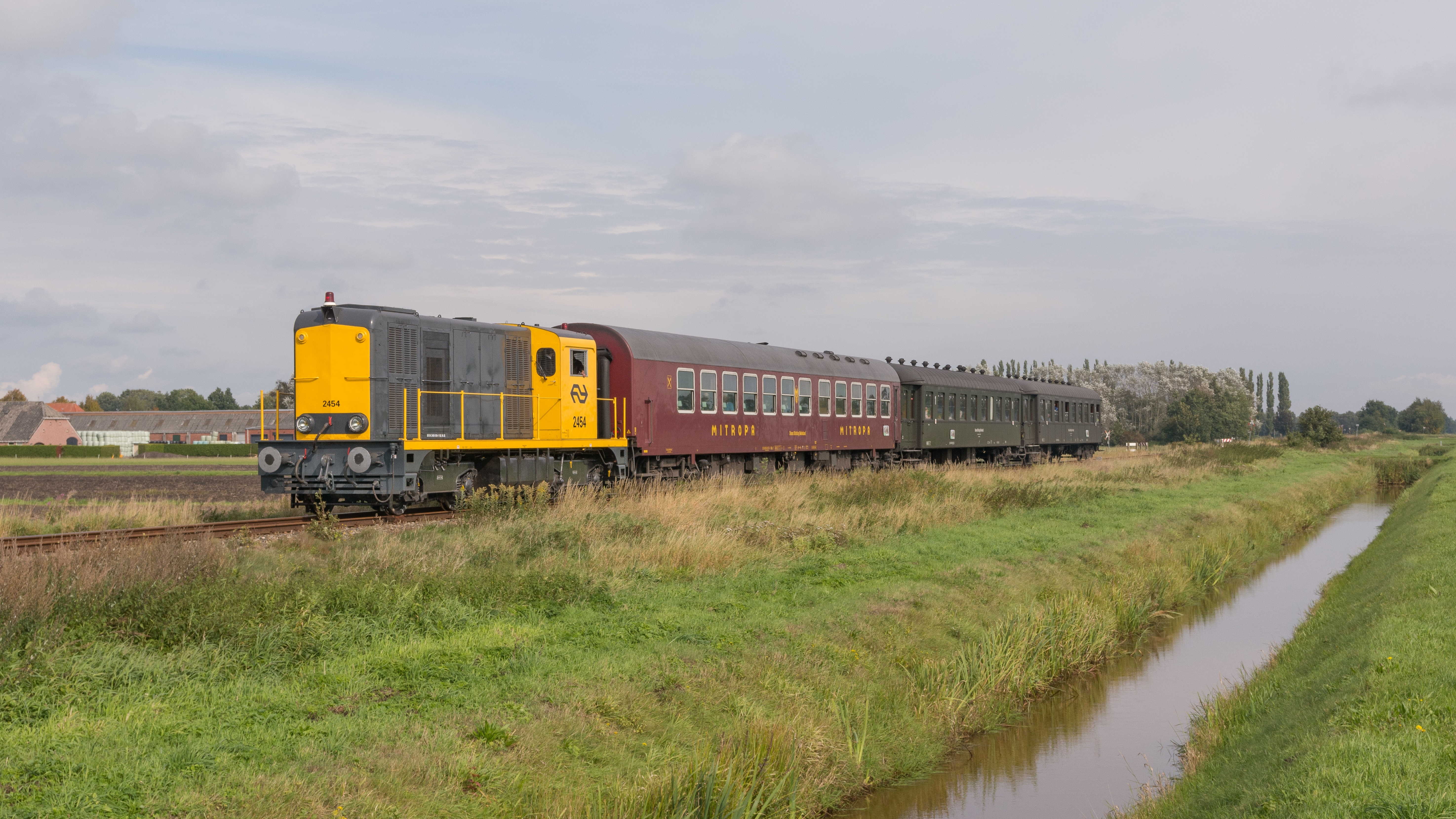 Vanuit Veendam rijdt bij Wildervank gastlocomotief,ex-NS 2454 met passagierstrein 3953 naar Stadskanaal. Aan de haak hangen SSN rijtuigen.